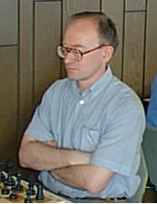 Adrian Michaltschischin, Sieger des Meisterturniers der Dortmunder Schachtage 1998.